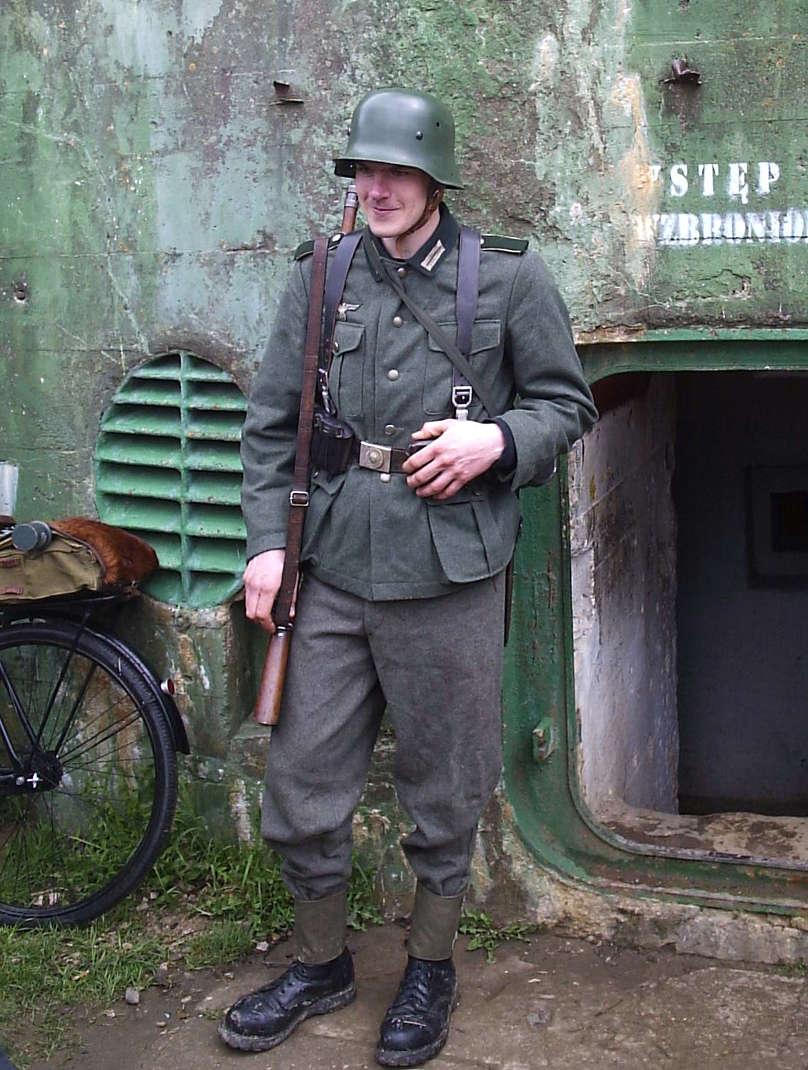 Członek Grupy Rekonstrukcji Historycznej 3 Bastion Grolman z Poznania (Międzyrzecki Rejon Umocniony - Pniewo, festyn).